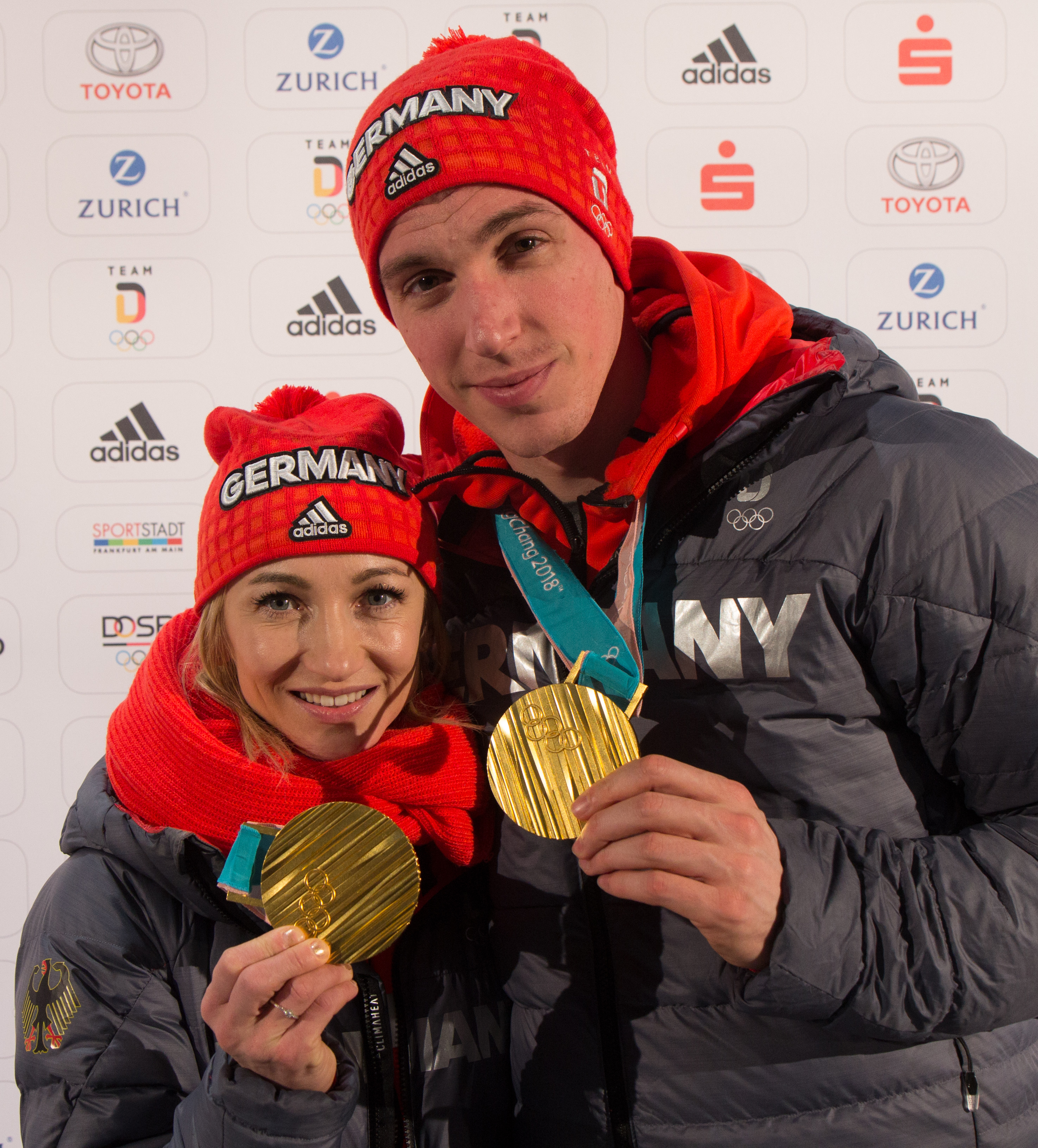 Ankunft der deutschen Olympiamannschaft am 26. Februar 2018 mit Flug LH713 auf dem Frankfurter Flughafen.